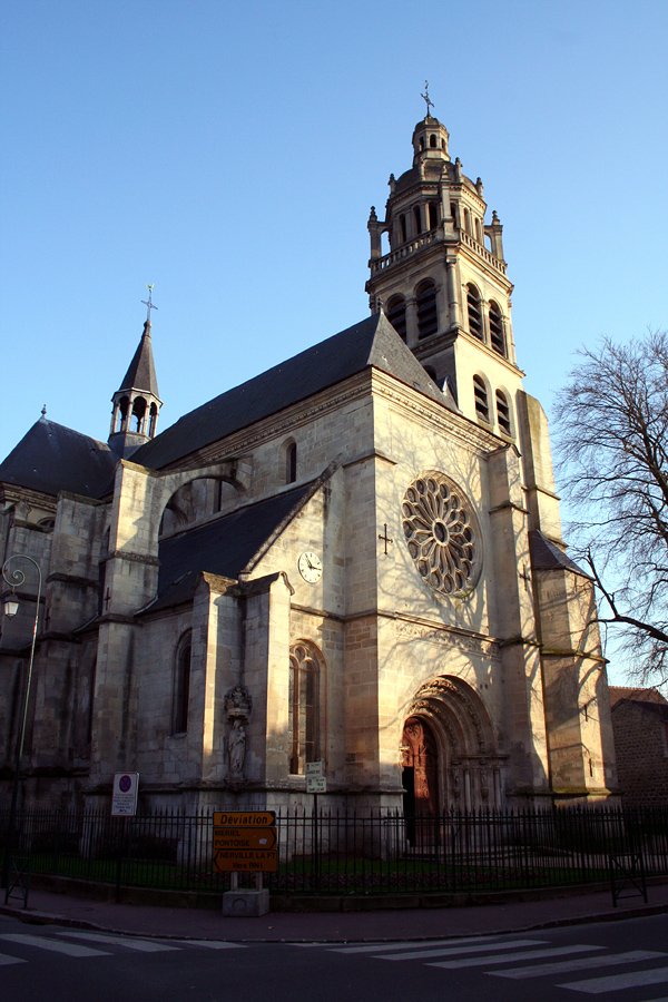 église Saint-Martin, L'Isle-Adam